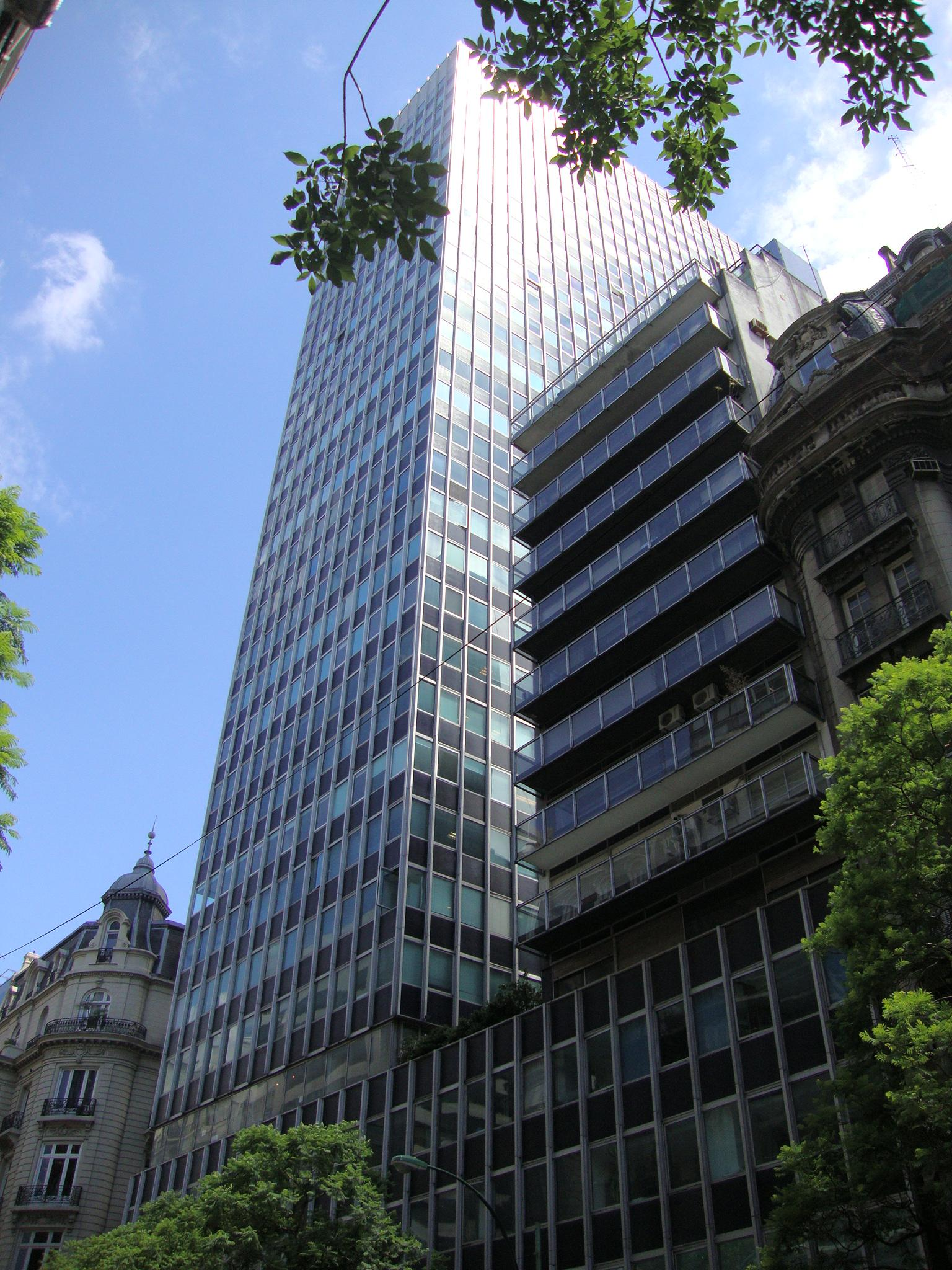 Torre Brunetta (o Torre Olivetti) vista desde la Av. Santa Fe. Buenos Aires, Argentina.